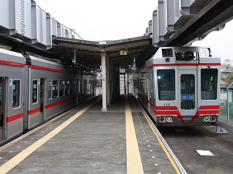 Croisement de monorails en gare de Mejiro-Yamashita